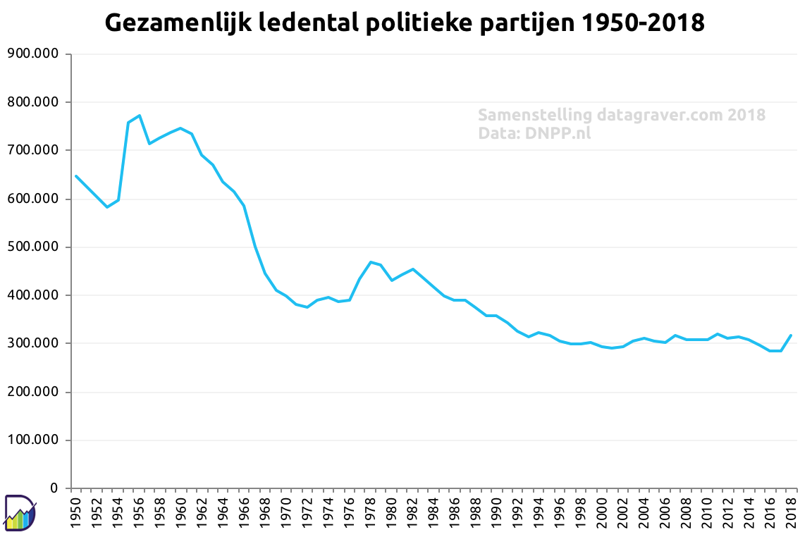 Gezamenlijk ledental politieke partijen 1950-2018